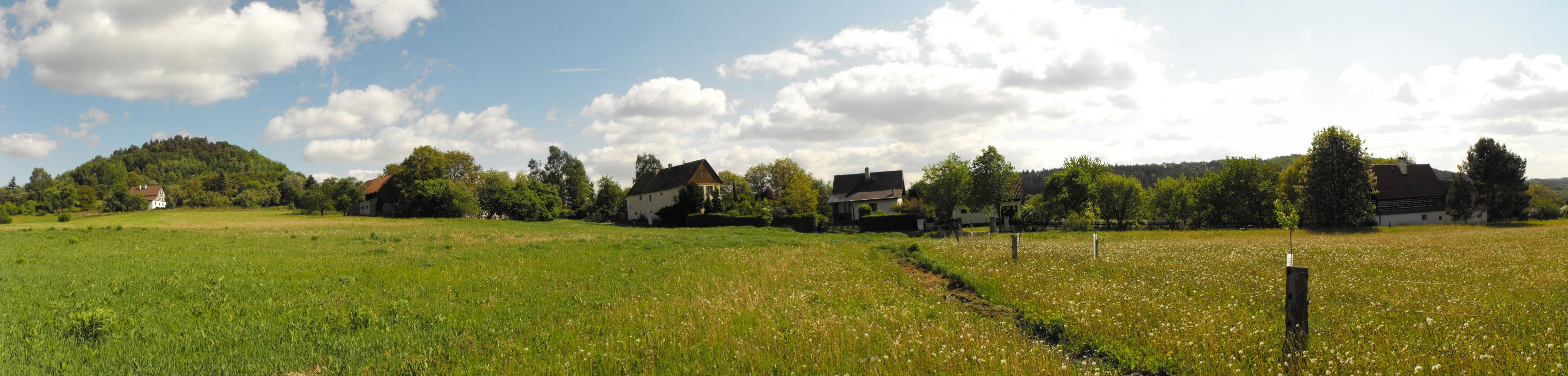 Panoramo de Křenov, Ĉeĥio. Ĝi estis kreita per la programo Hugin.